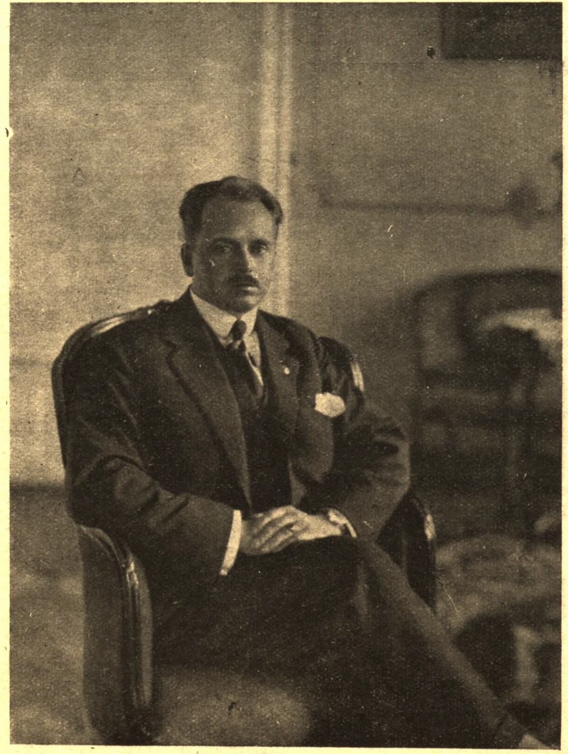 Od 10 lipca 1930 do końca lutego 1934 piastował stanowisko wojewody białostockiego.